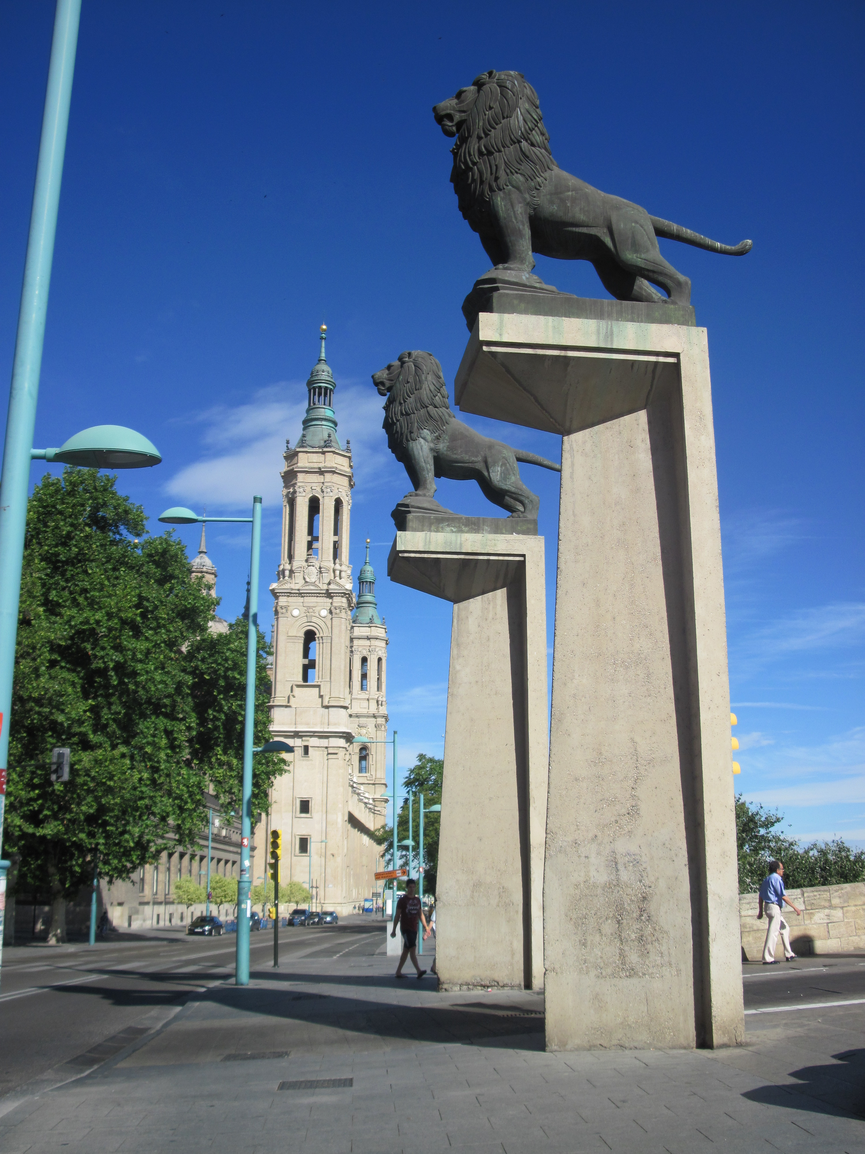 Львы на Каменном мосту Unknown